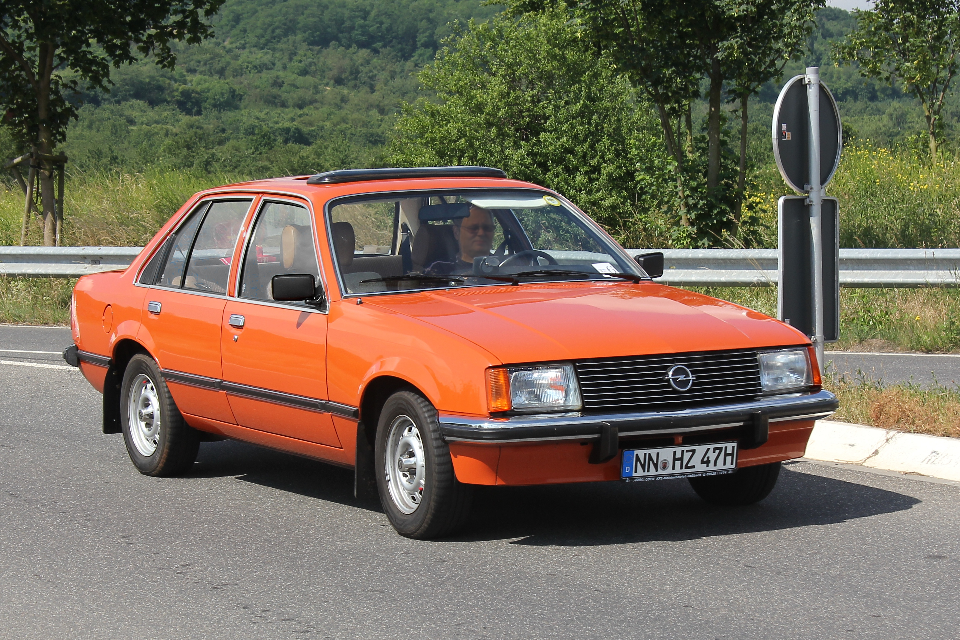 Opel Rekord E (fiktives Kennzeichen) bei einer Ausfahrt zum Oldtimertreffen des Automobilclubs Mülheim-Kärlich